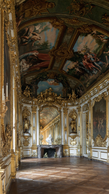 Vue à l'opposé de l'entrée, avec la voûte, les boiseries, la cheminée et le buste de François Mansart